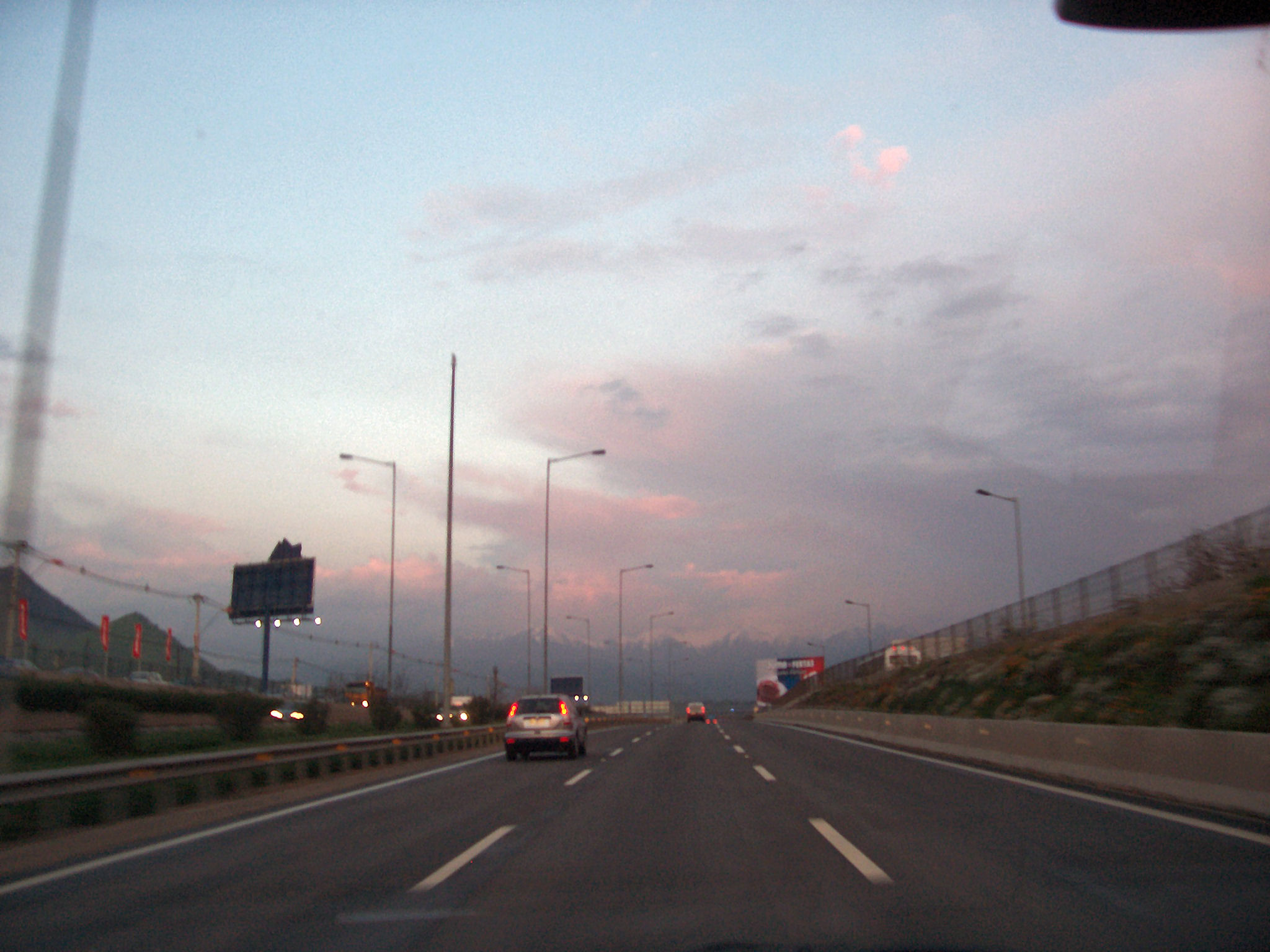 Avenida Americo Vespucio